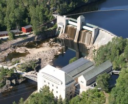 Nomeland Kraftstasjon